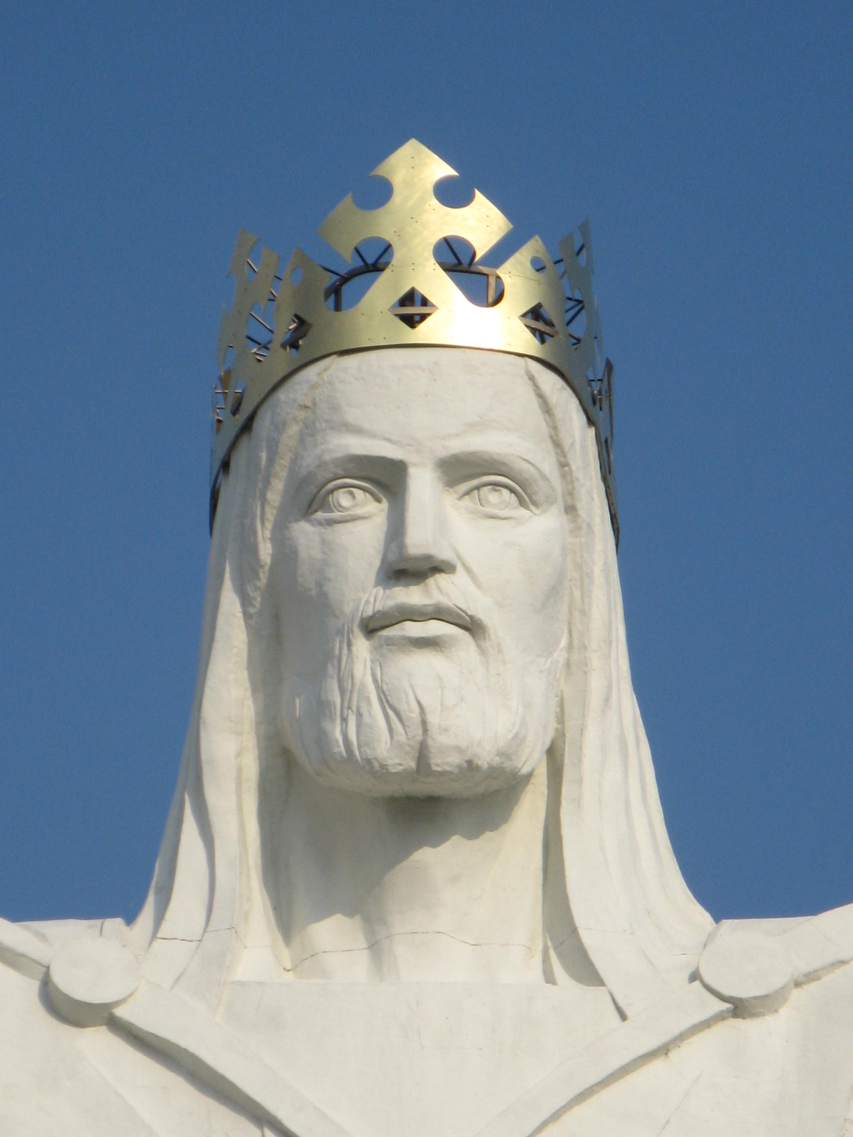 Pomnik Chrystusa Króla w Świebodzinie